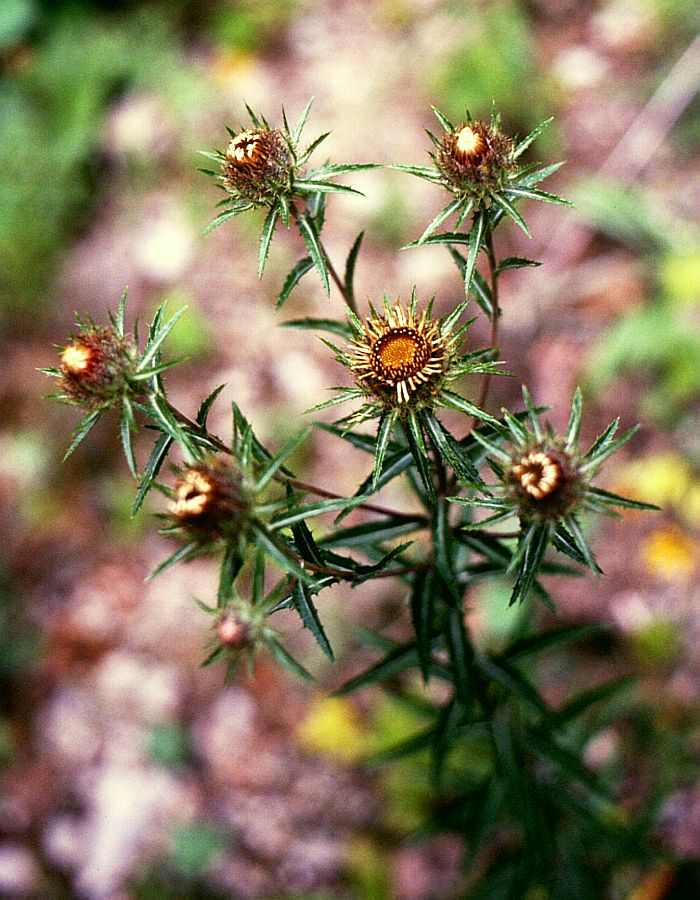 Langblatt-Golddistel (Carlina biebersteinii subsp. biebersteinii), Korbblütler (Asteraceae) - Österreich/Austria/Autriche: Niederösterreich, Erlauftal E Gaming, Vordere Tormäuer